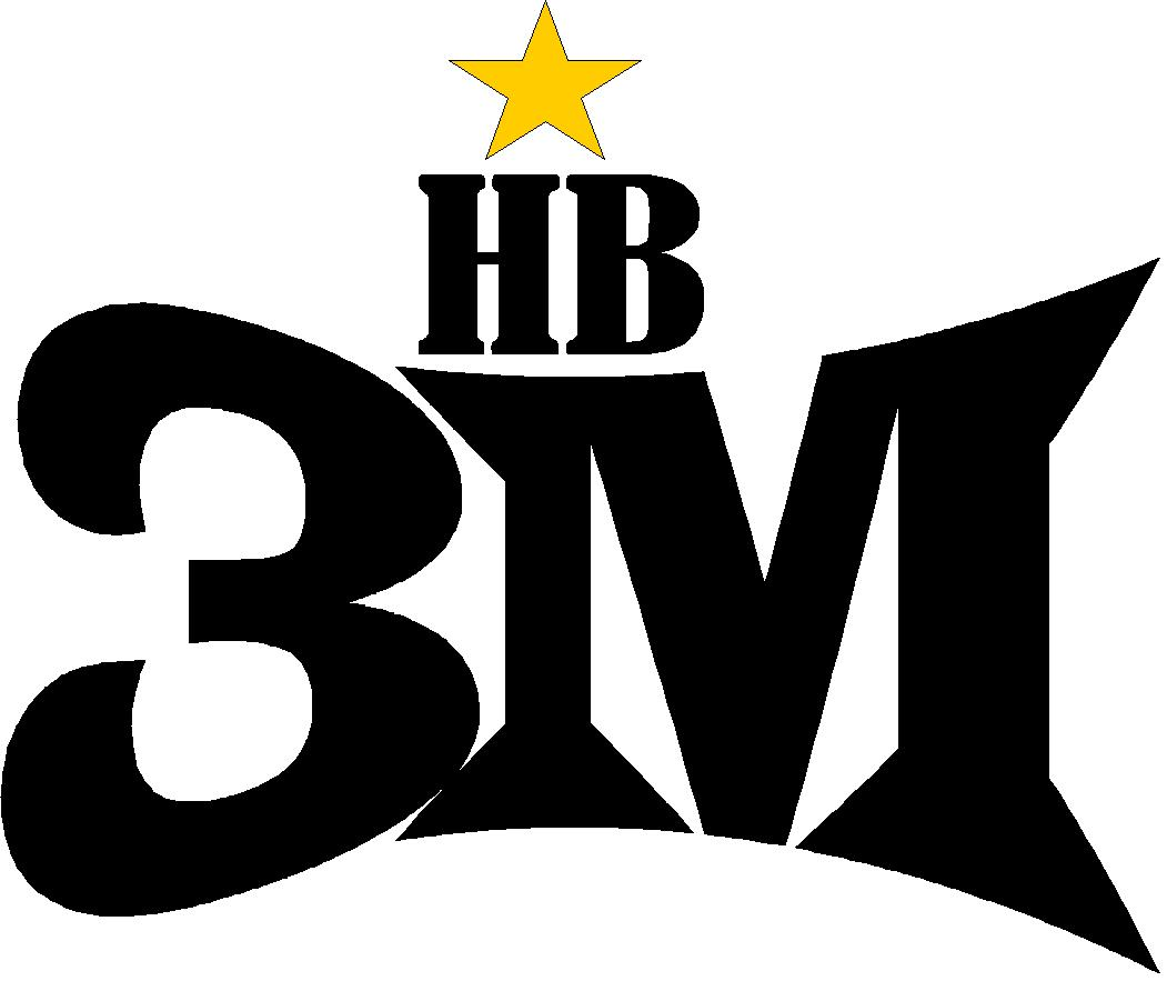 Logo du HB3M créer par Laurent Baudet.